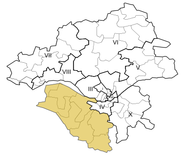 Carte de la neuvième circonscription de la Loire-Atlantique